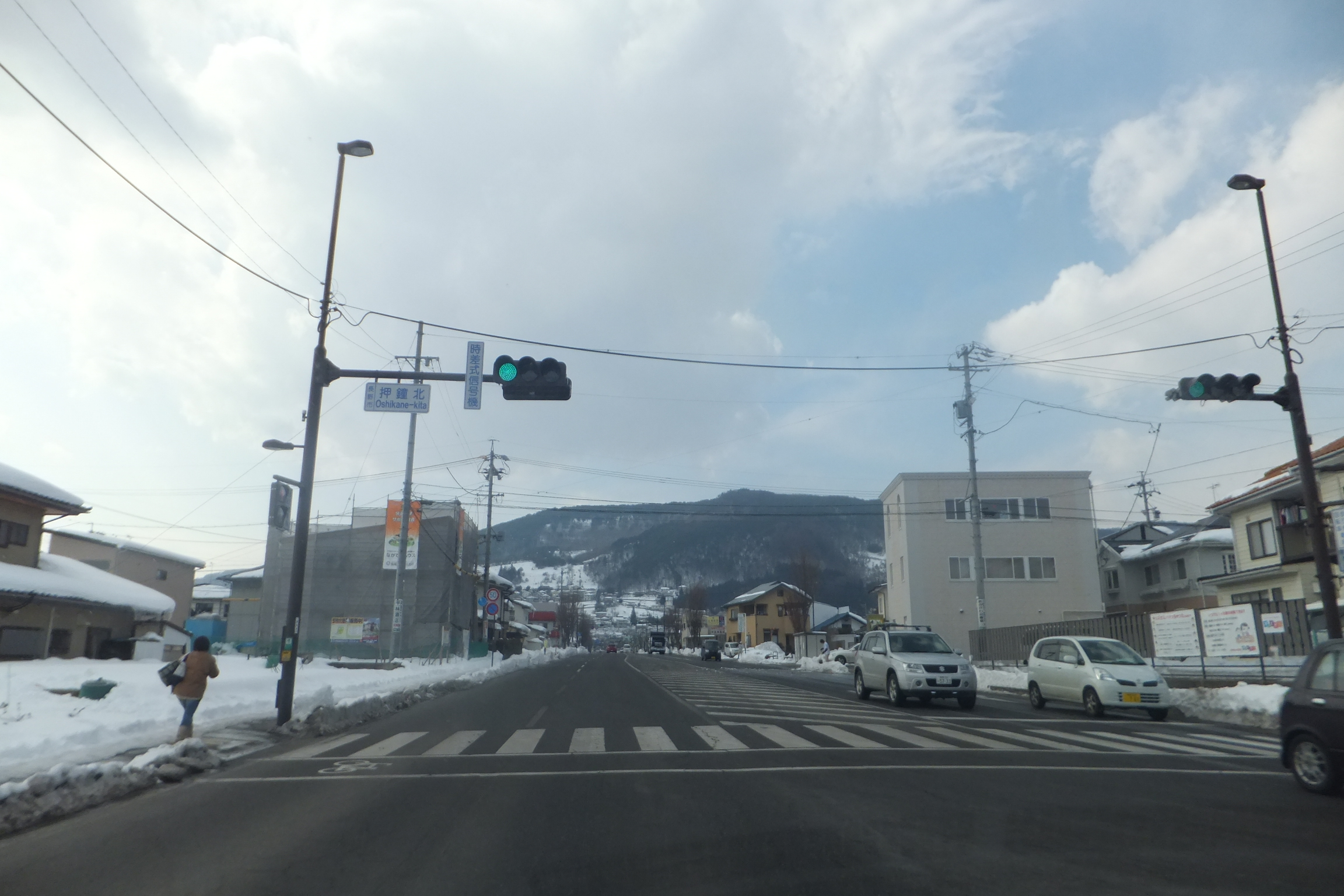 長野県長野市神鏡